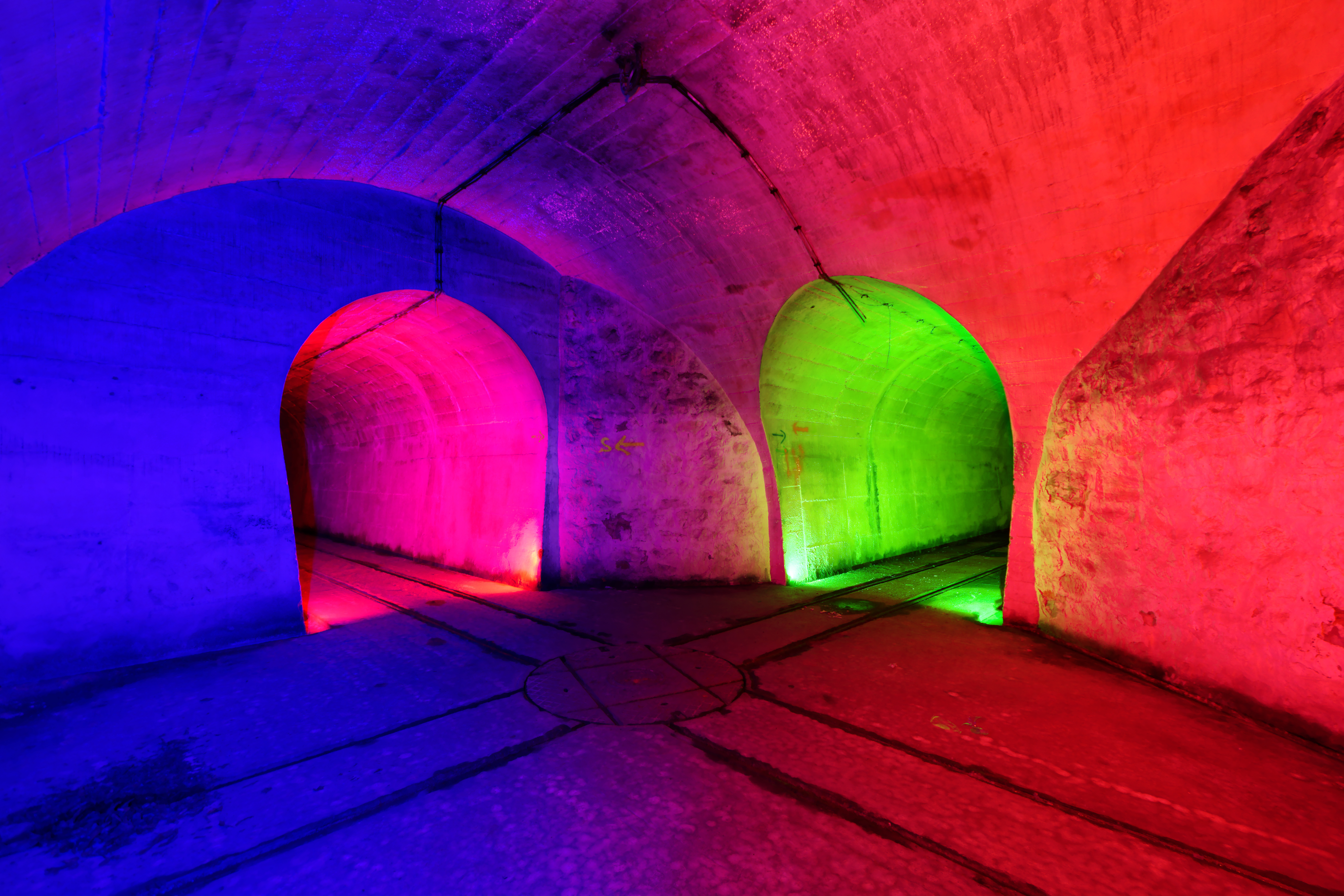 Ouvrage "G" de la D.A.T. : locaux souterrains : à proximité de l'entrée du matériel (lightpainting).